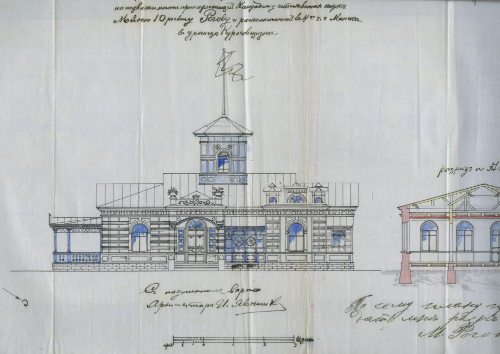 Праект на пабудову дачы ў Курасоўшчыне пад Мінскам.